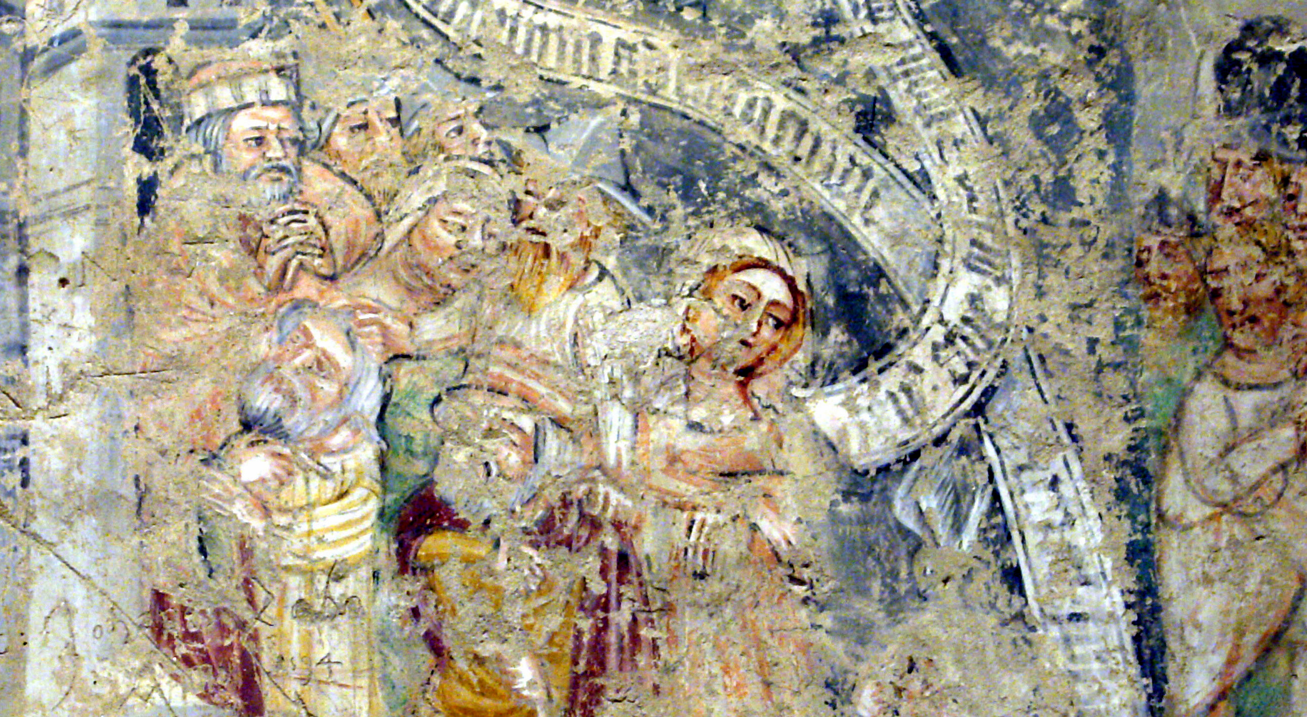 Toronyhely, - freskórészlet